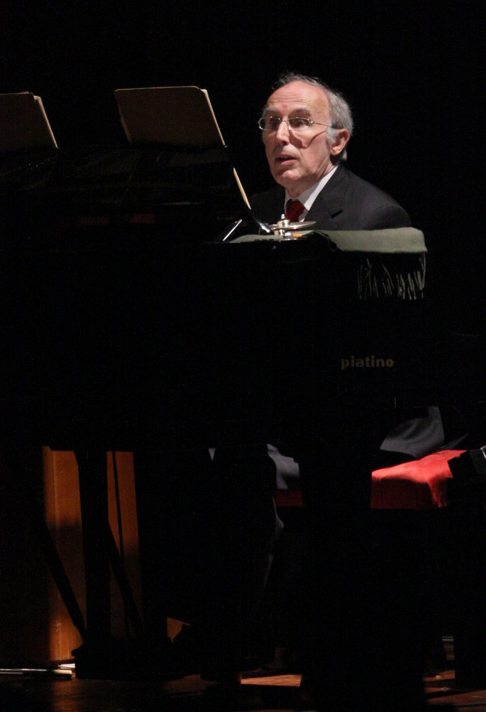 Torino 3 settembre 2008, Sala 500 Lingotto - Bruno Canino